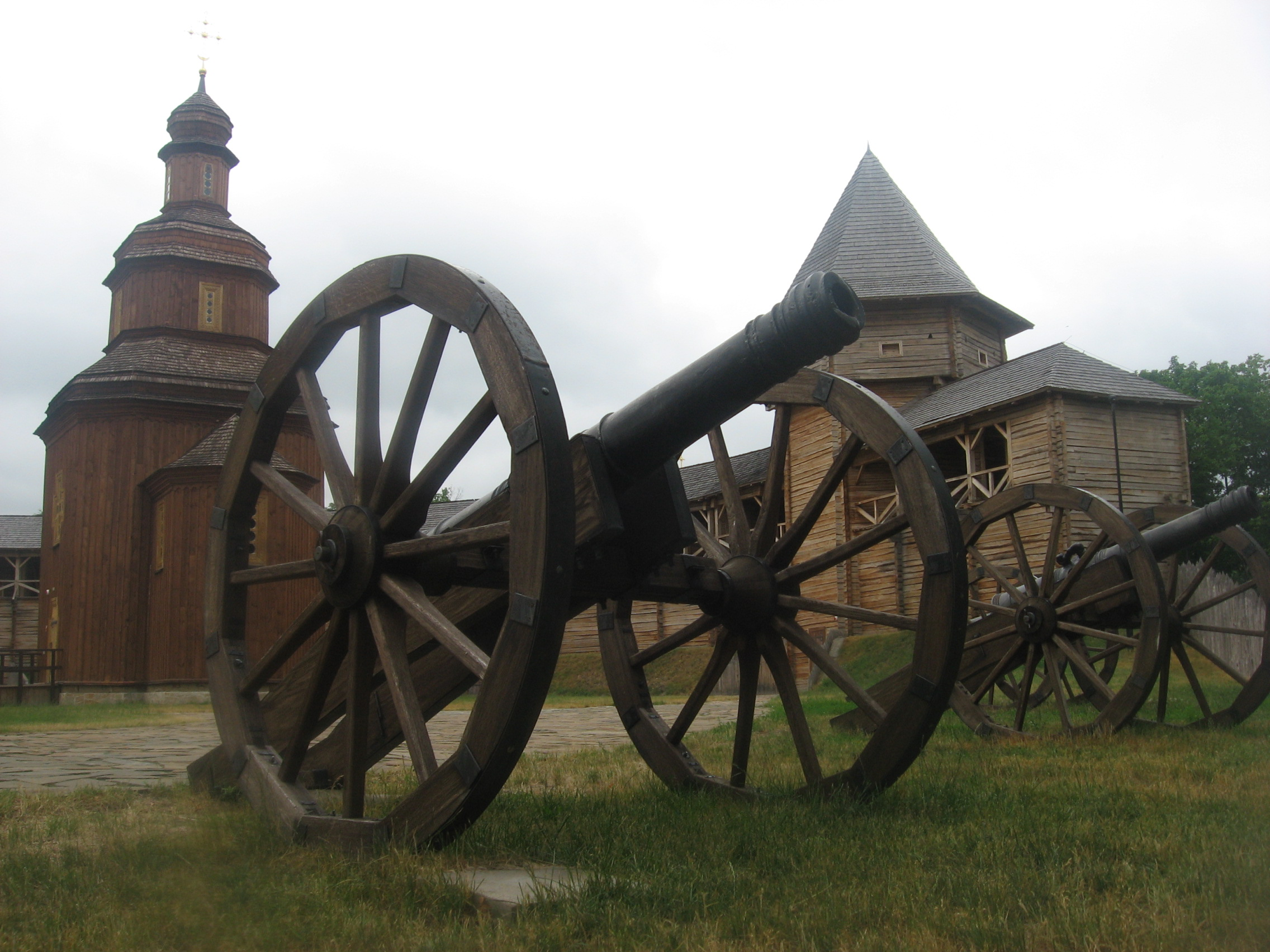 Батуринська фортеця